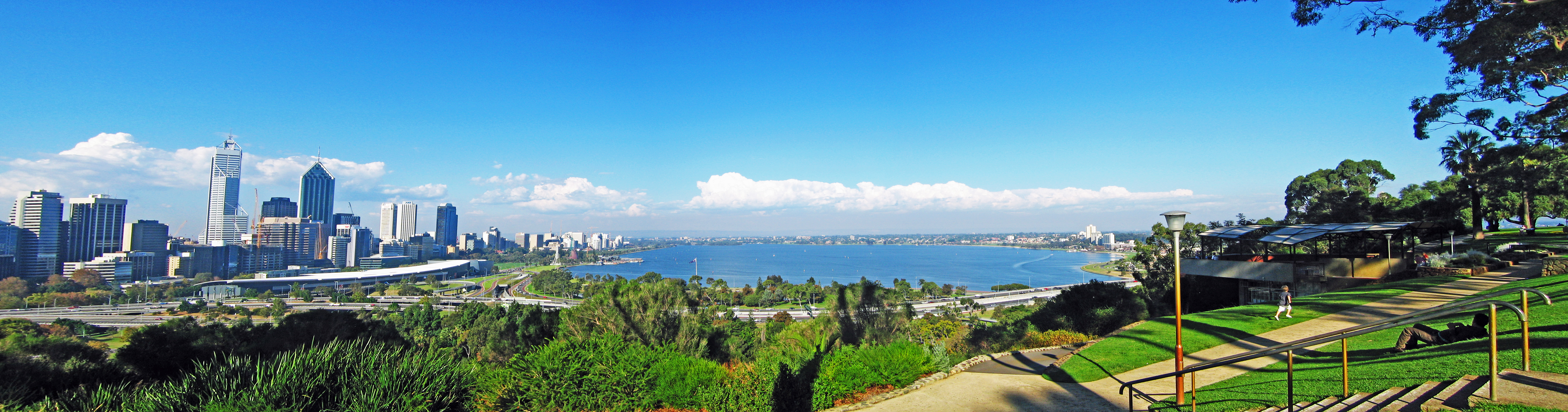 Vue sur la ville. Vue panoramique sur Perth.